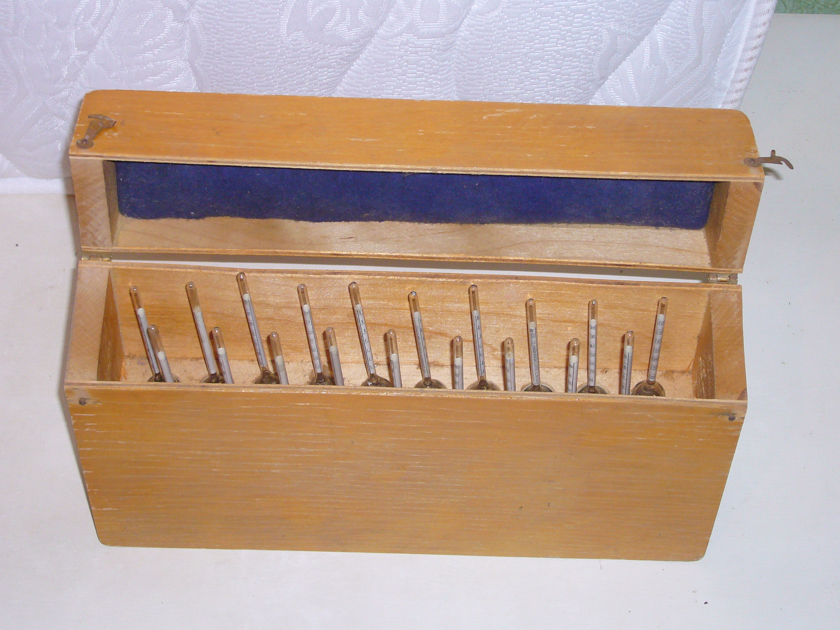 Набор ареометров постоянной массы для измерения плотностей жидкостей от 0,54 до 1,85 по воде